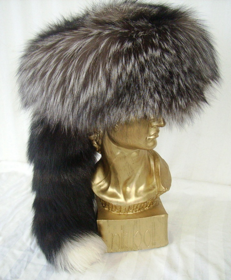 Trappermütze aus Silberfuchs.